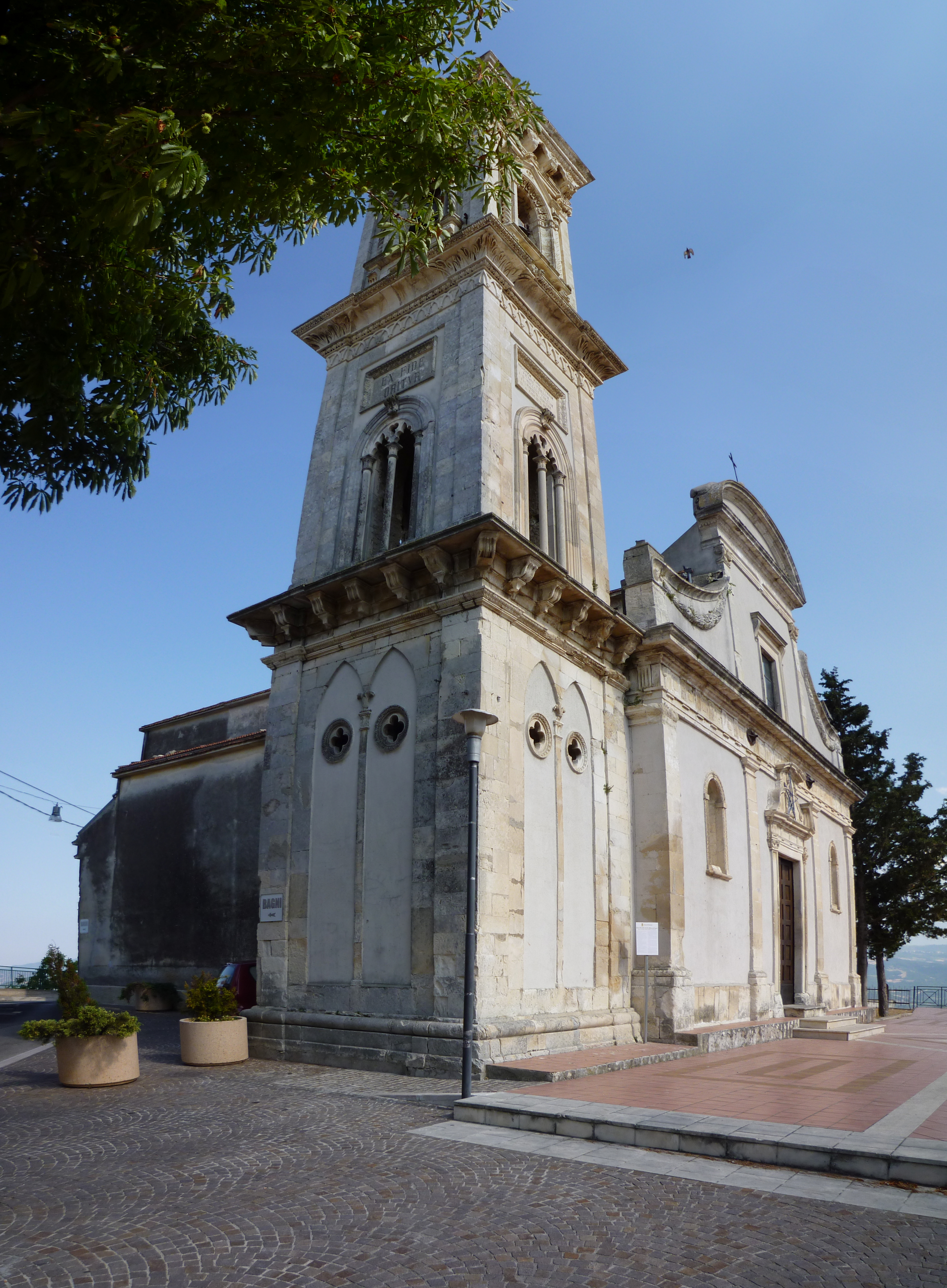 Panoramica della chiesa madre di Palombaro, Chieti.